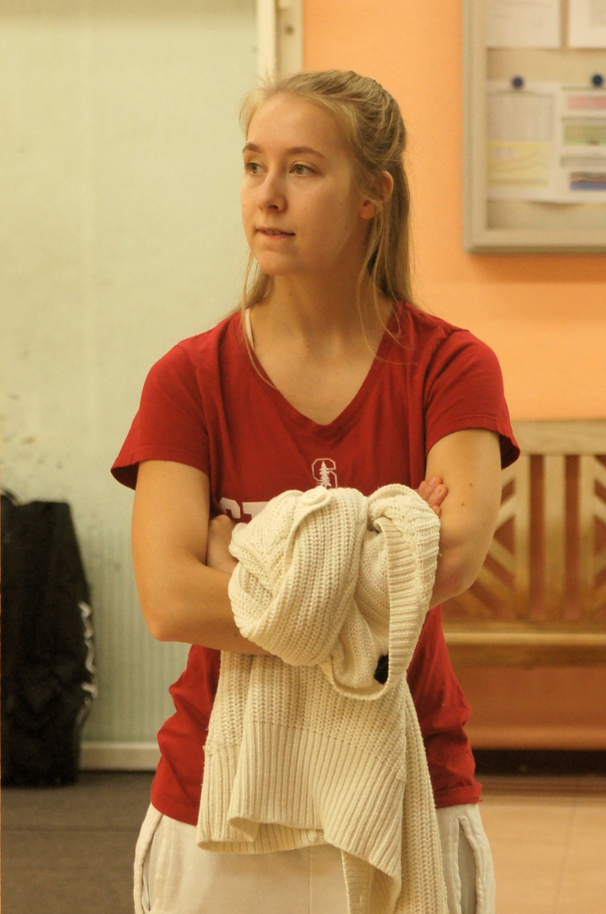 Emilia Soini, Monaco Squash classic 2018